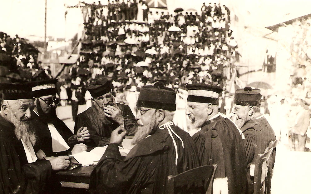 Tobera tradizional bateko epaileak